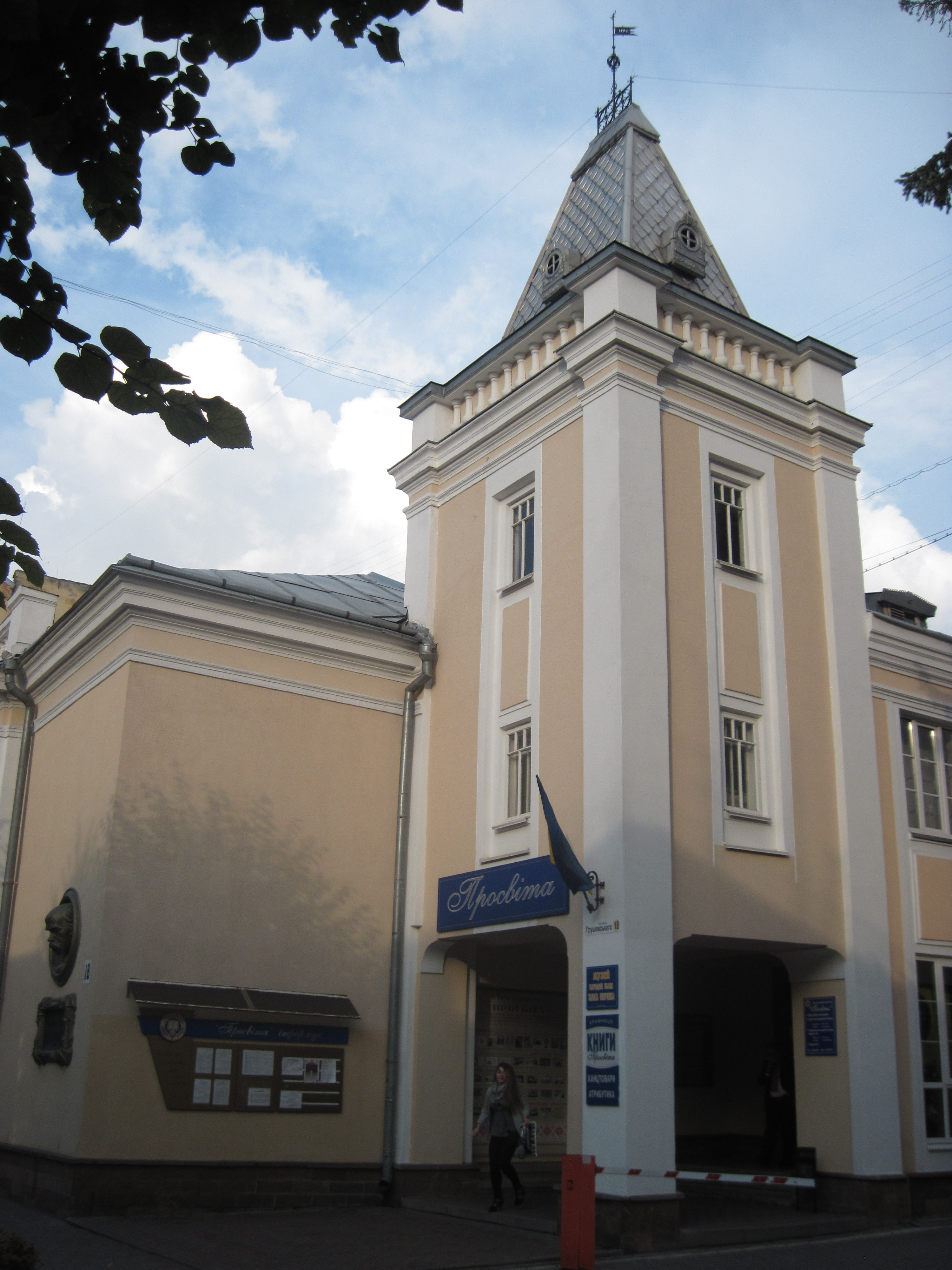 Букдівля, Просвіта, Франківськ